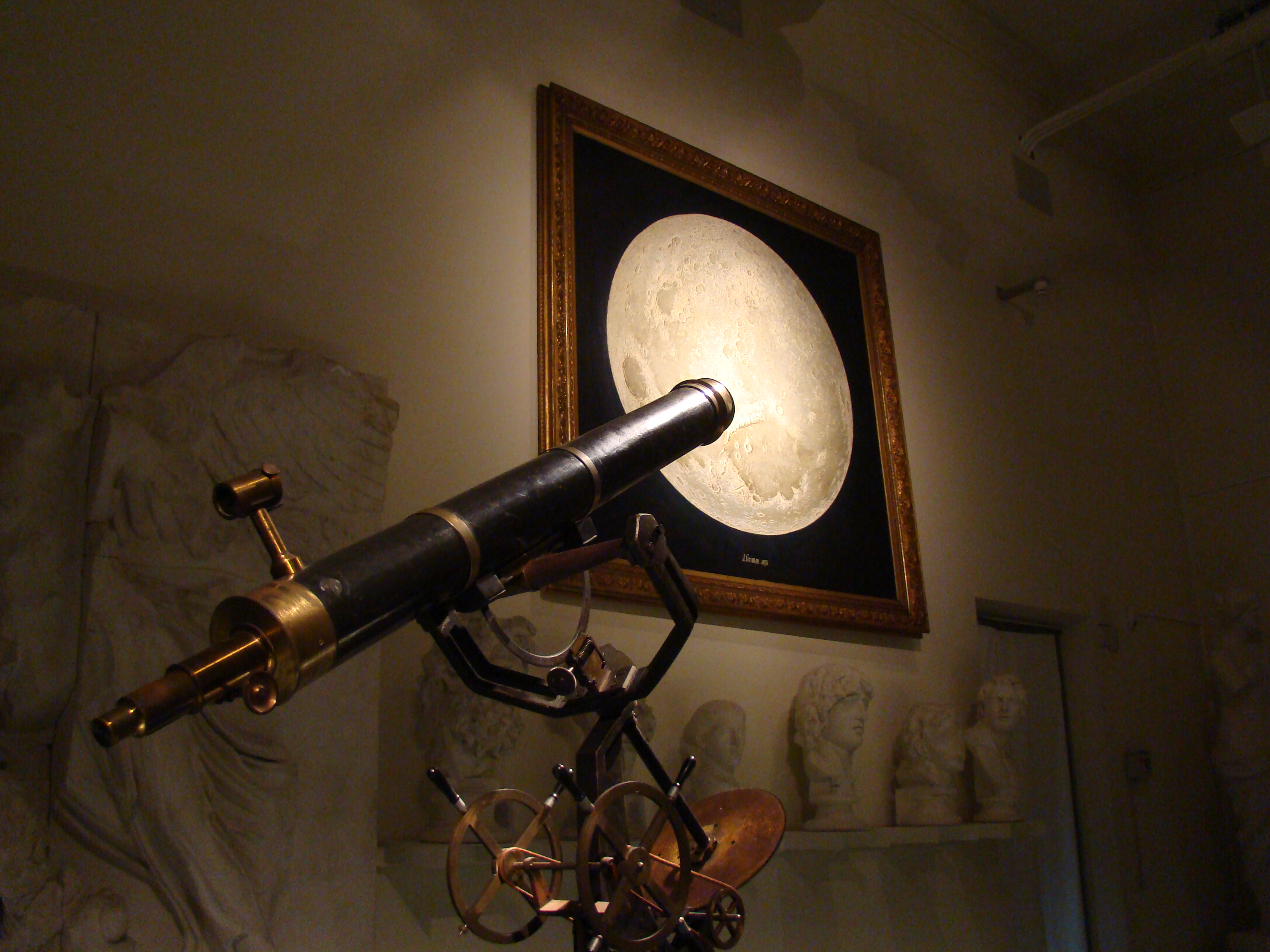 Teleskop vor Mondbild, Rittersaal Hohentübingen